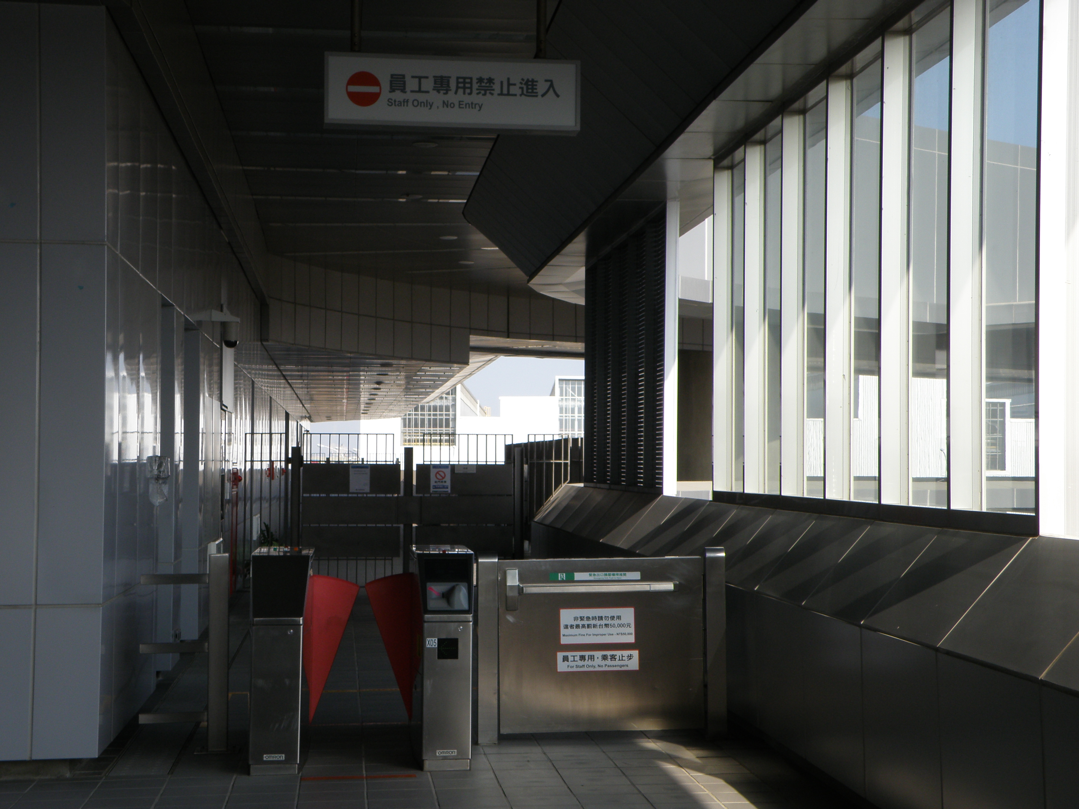 高雄捷運大寮站只限職員使用的Omron自動閘門。